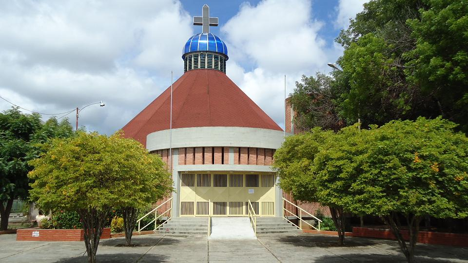 Iglesia San Martín de Porres. Ubicada en el sector Ambrosio. Cabimas.